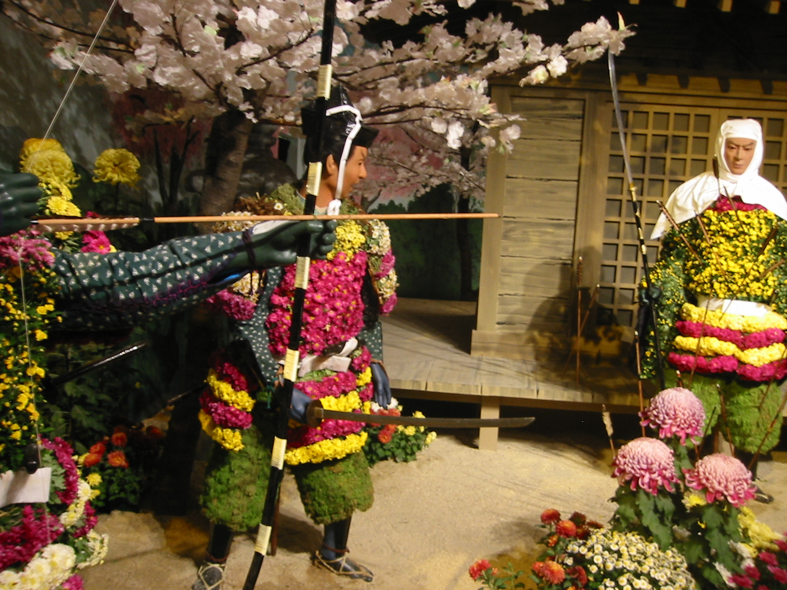 ひらかた大菊人形 義経 第八場面 弁慶、立往生